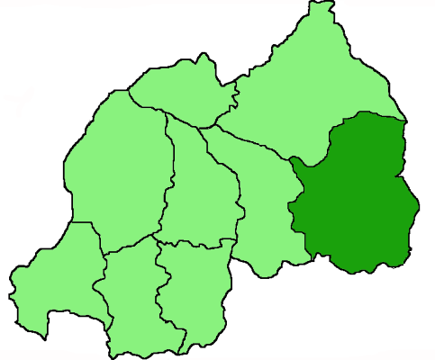 Mappa della diocesi cattolica di Kibungo, in Ruanda. Anno 2009.